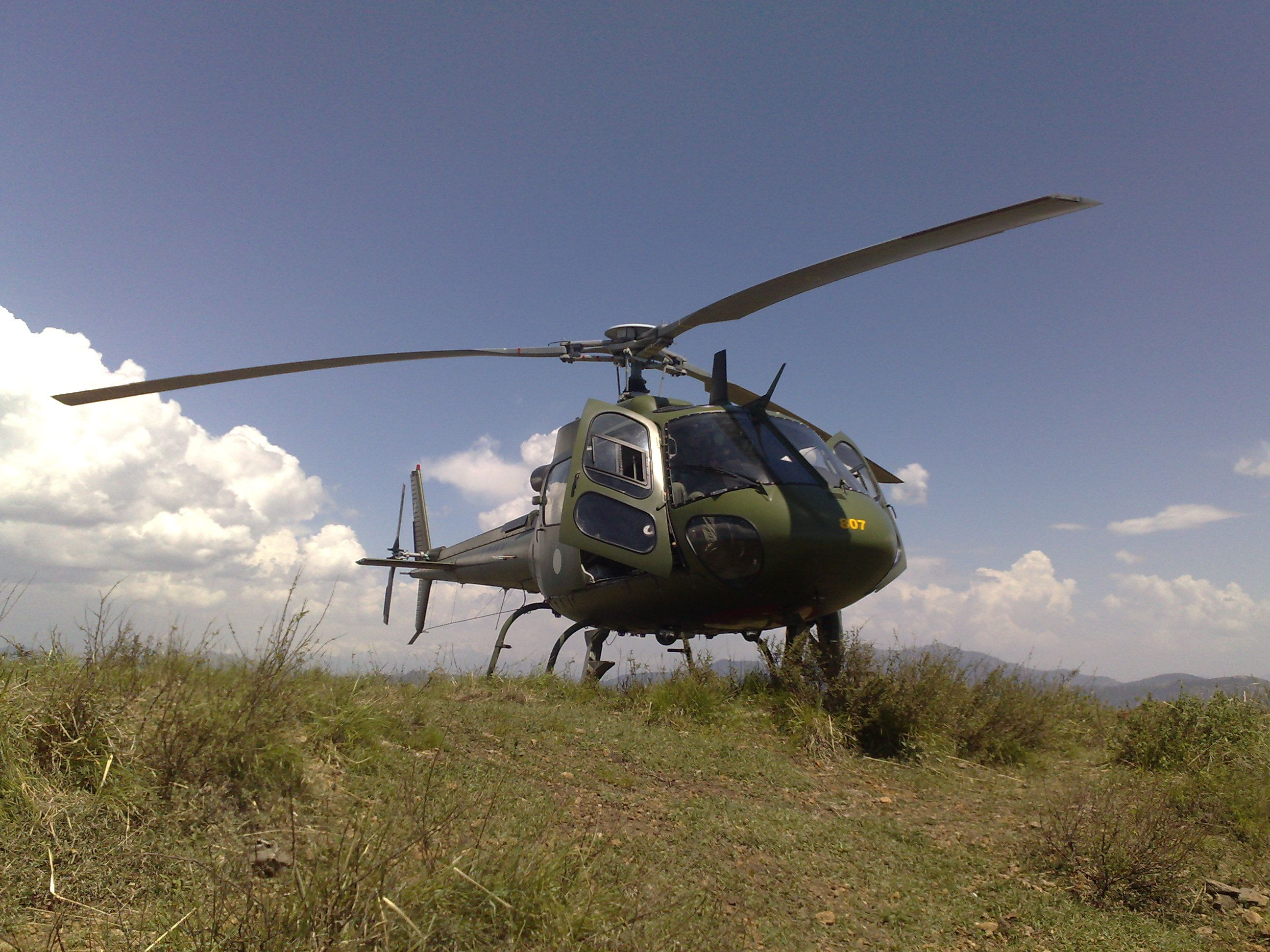 Pakistani forces captured Baine Baba Ziarat, the highest point in Swat valley, 10 days ago. Un des 10 AS350 Ecureuil B3 commandé à Eurocopter en 2004 et reçue à partir de 2006..